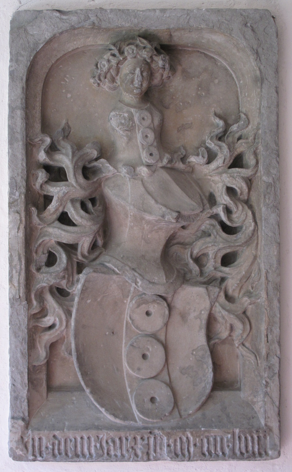 Kirche Utzenstorf, Wappen von Ringoltingen